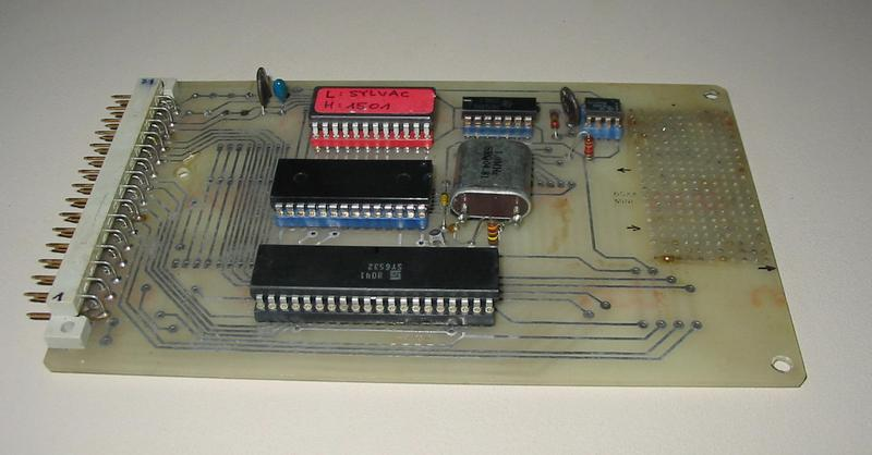 EMUF mit 6504-CPU auf Europakarte